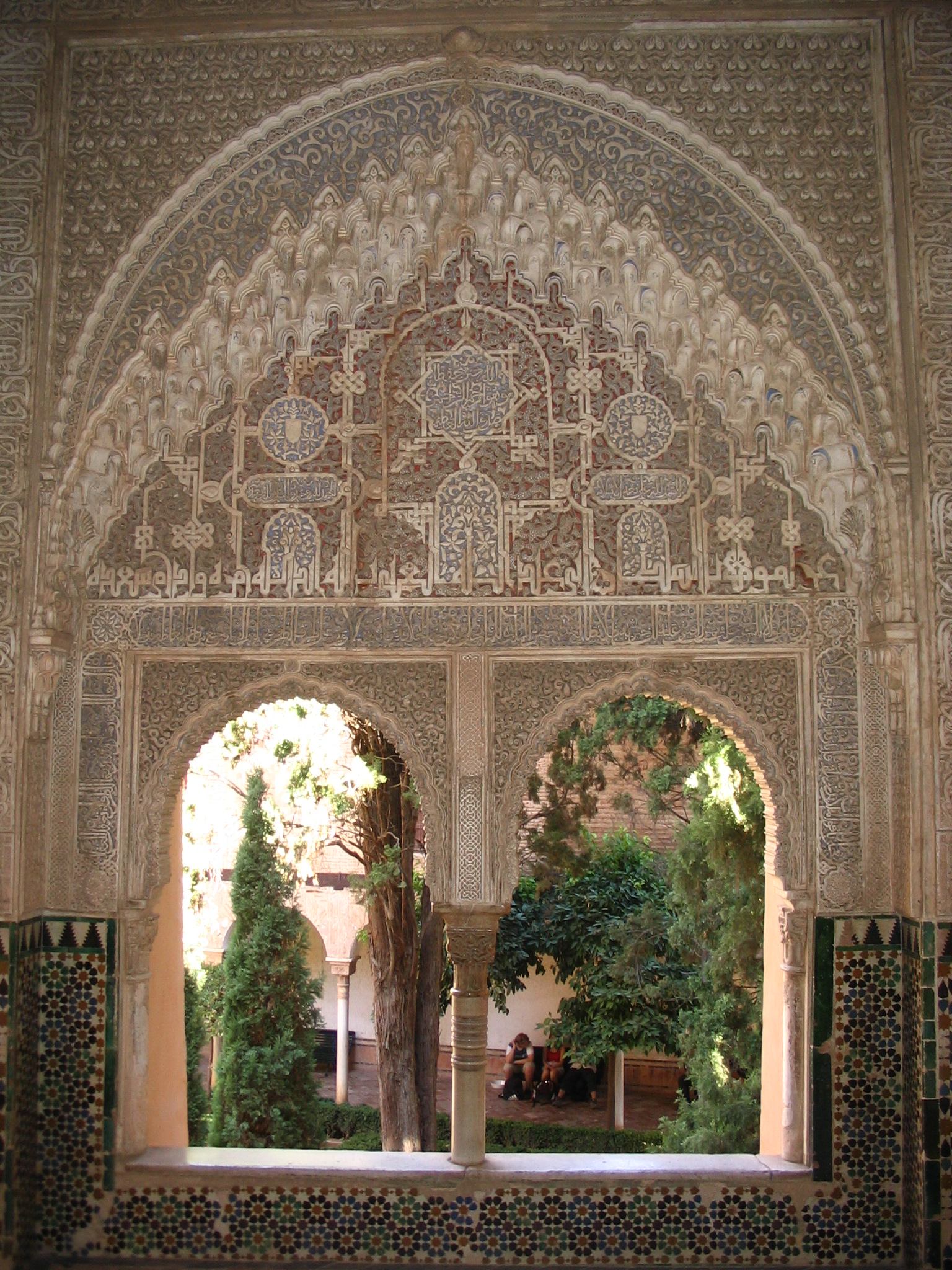 Mirador de Lindaraja, dentro del palacio de los Leones, Alhambra de Granada Picture taken by myself.